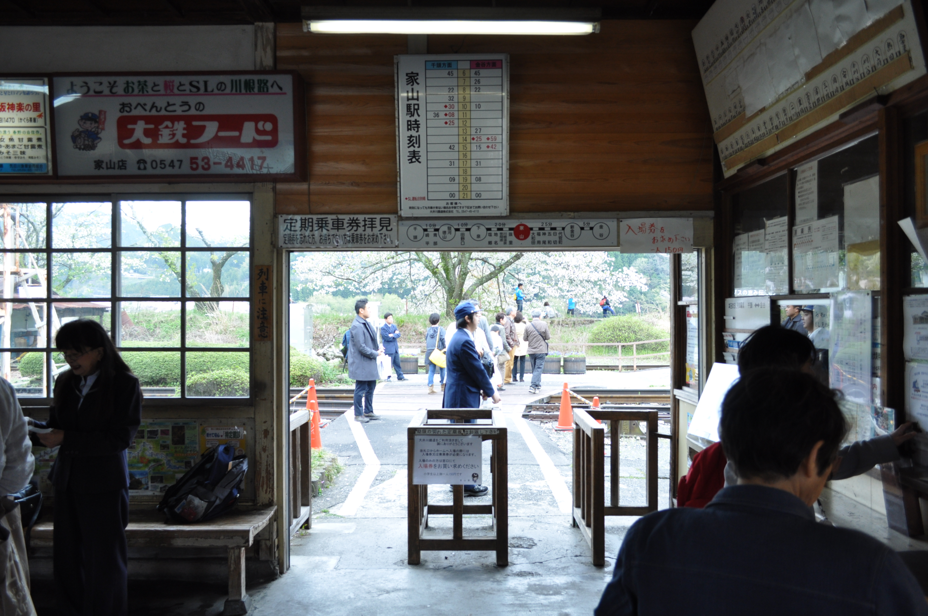 （2015年4月4日撮影）